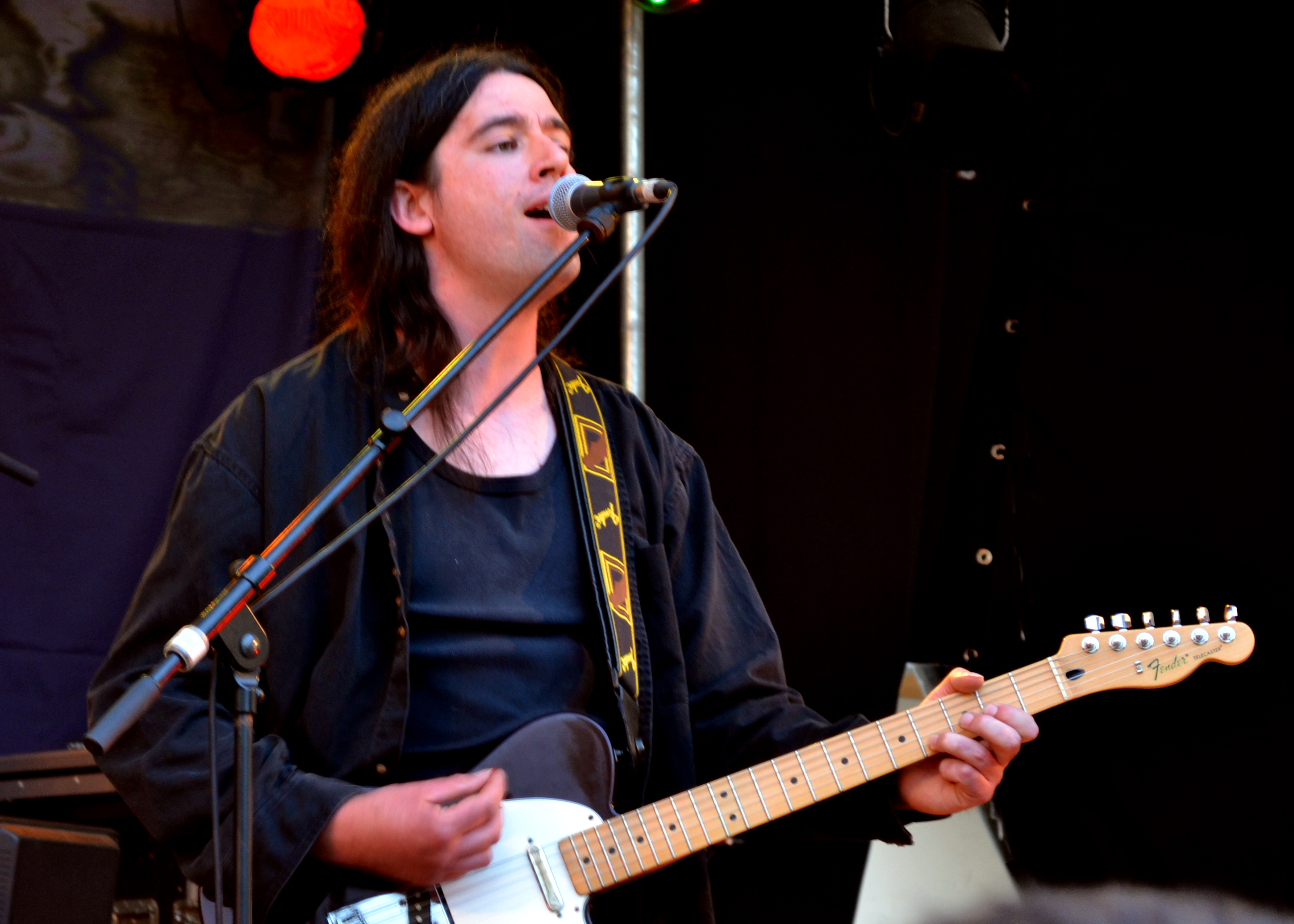 Concert de Brieg Guerveno (rock en breton) au Festy'Jeanne, festival des Légendes Celtiques, à Plouégat-Moysan le 4 mai 2013.